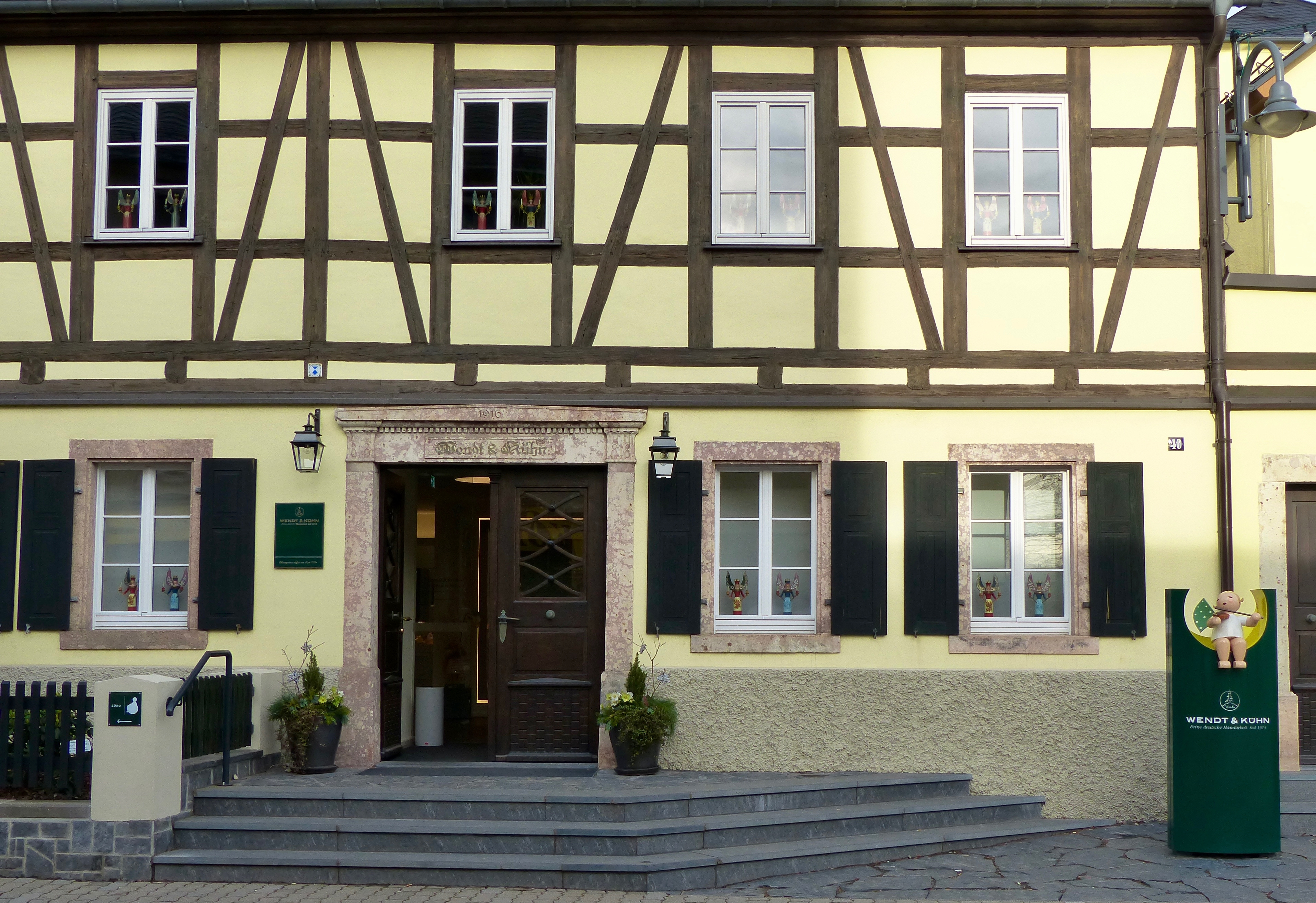 Stammsitz von Wendt & Kühn in Grünhainichen